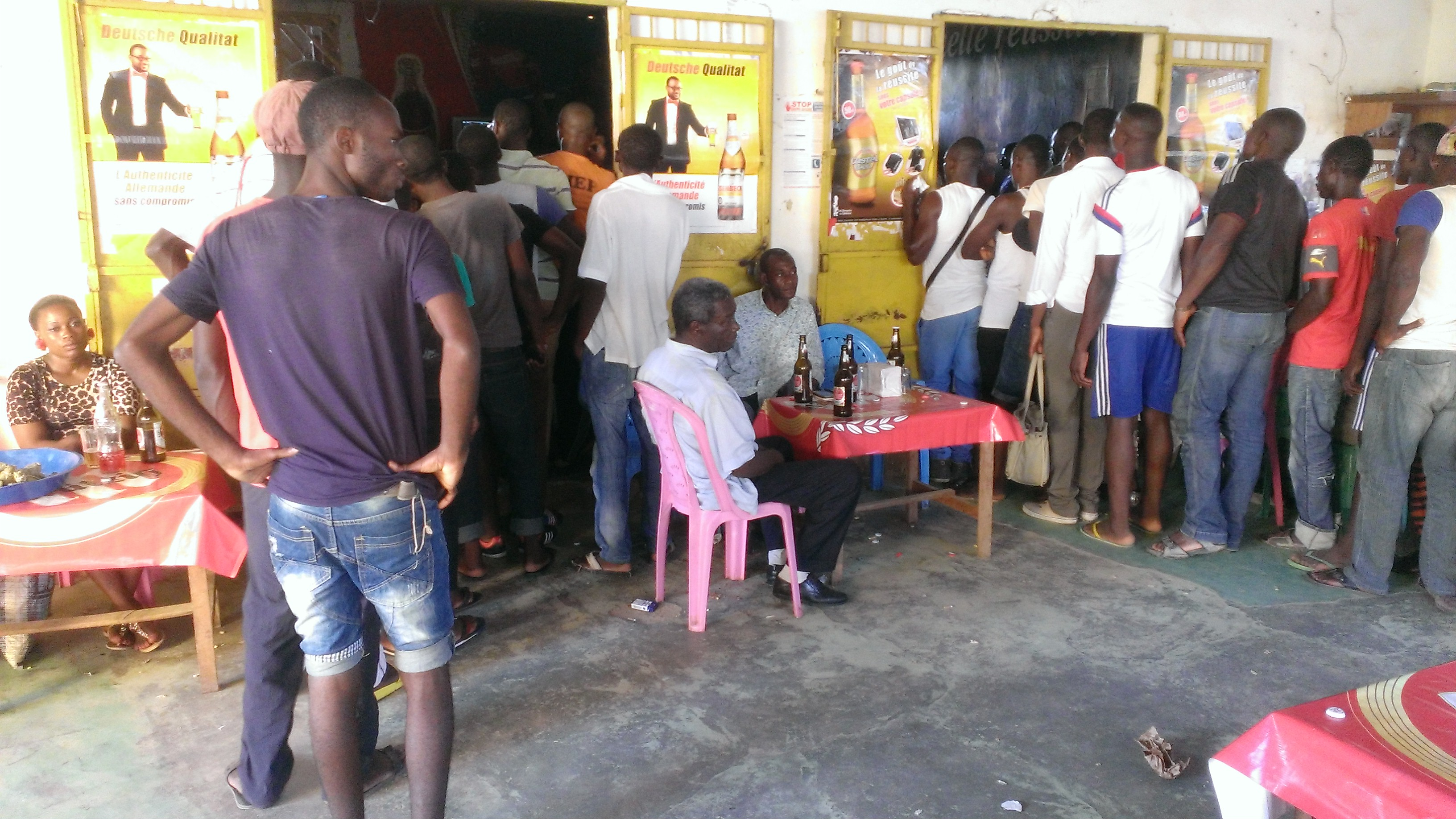 Il est courant au Cameroun dans certaines localités de voir les spectateurs affluer dans les bars qui mettent les grands moyens pour pouvoir diffuser les matchs de champions league. This is an image with the theme "Play" from: Cameroon